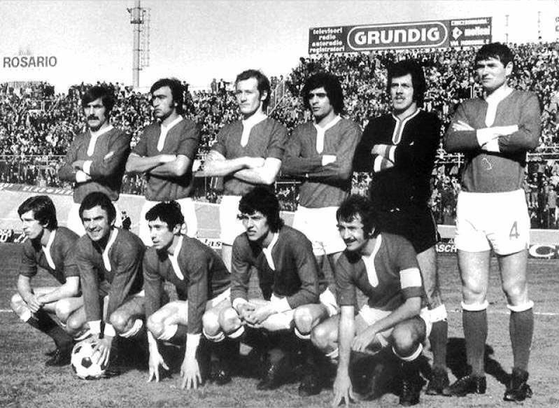 Una formazione del Varese nella stagione 1973-74.